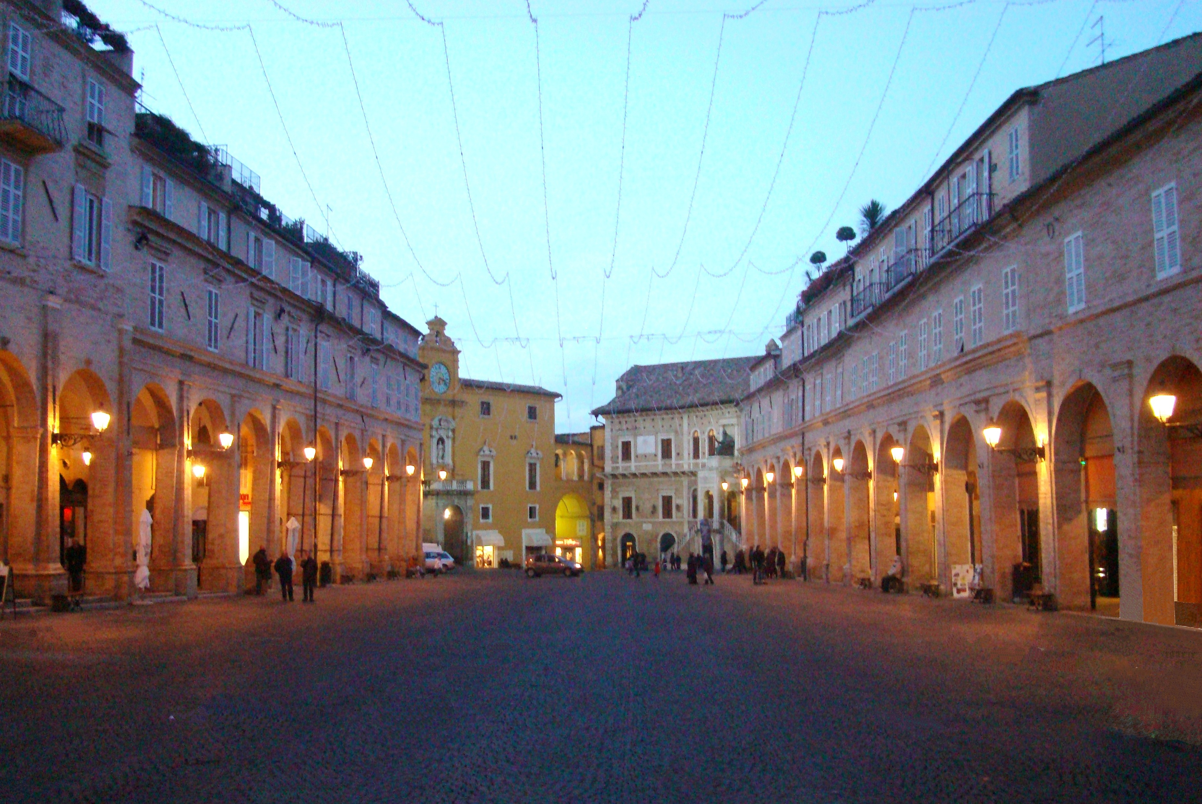 Piazza del Popolo di Fermo: una delle più antiche e suggestive piazze italiane .